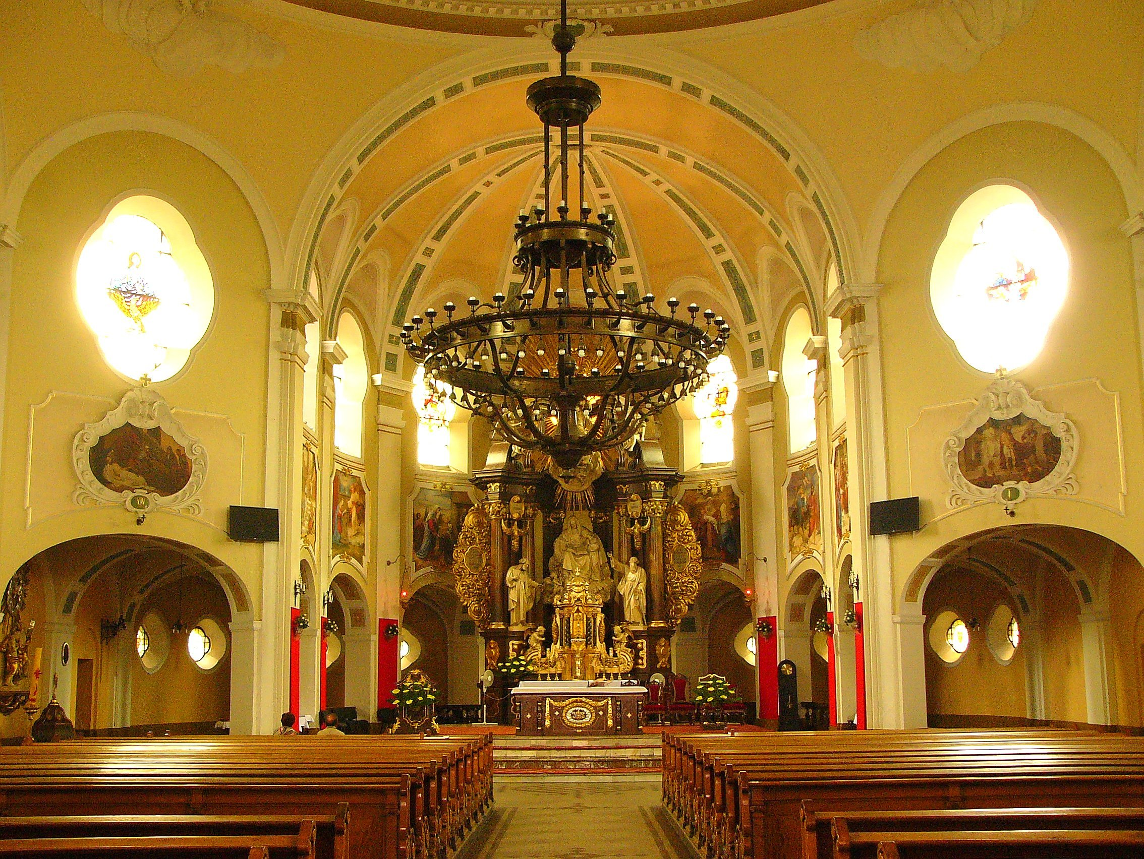 Katowice Janów, pl. Wyzwolenia 21 - kościół pw. św. Anny (zabytek nr A/350/11 z dnia 5.09.2011)